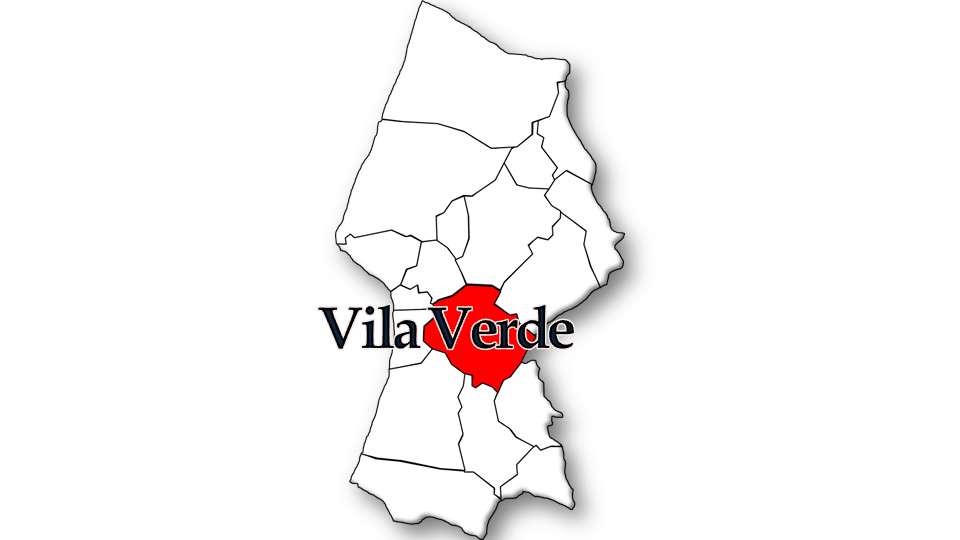 População